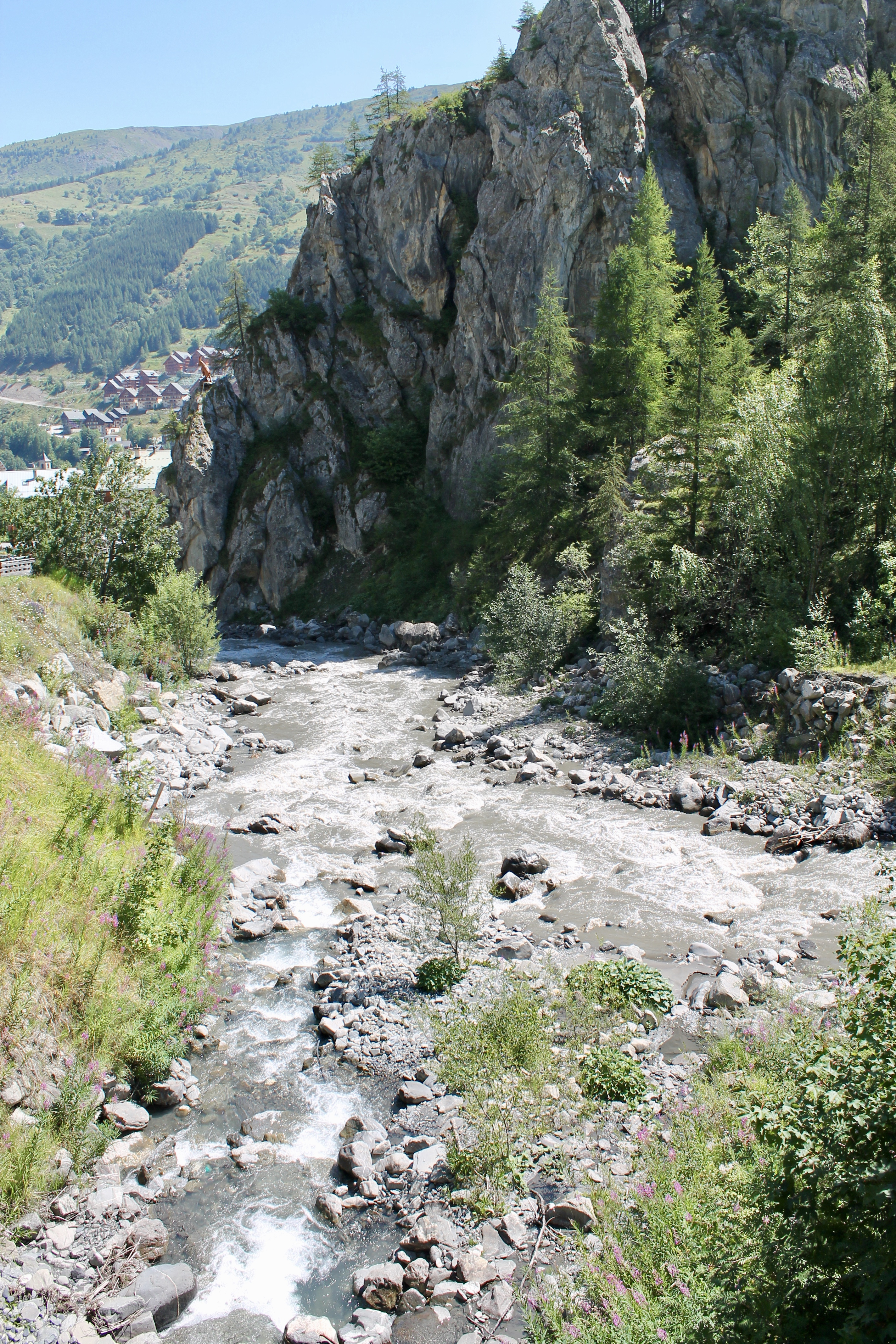 Ruisseau de Pémian se jetant dans La Valloirette à La Borgé (août 2018).